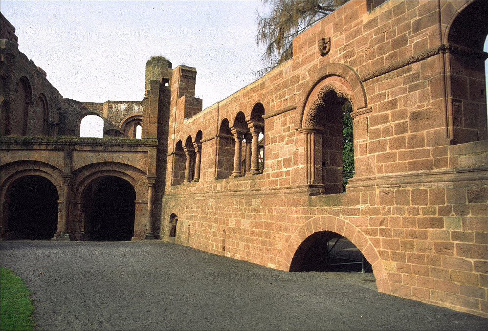 Gelnhausen - Reste der Kaiserpfalz [1]